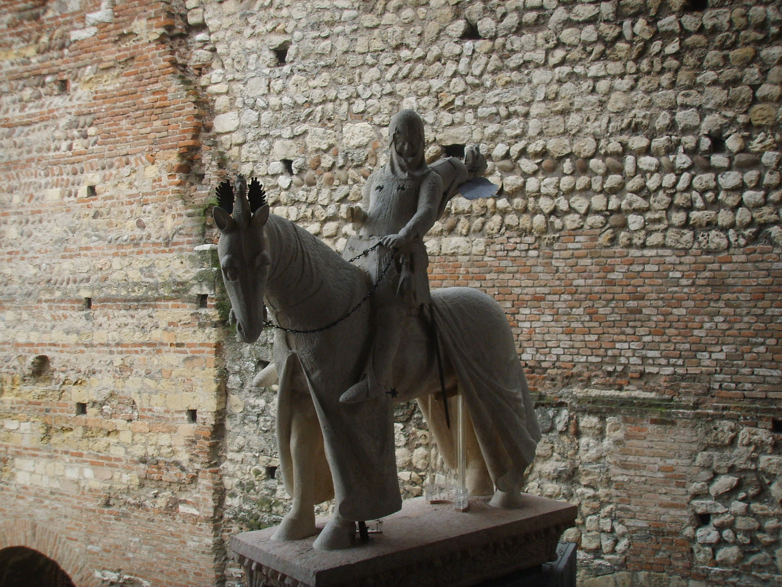 La statua equestre di Cangrande della Scala, proveniente dalla Arche scaligere di Verona, oggi conservata presso il Museo di Castelvecchio a Verona.